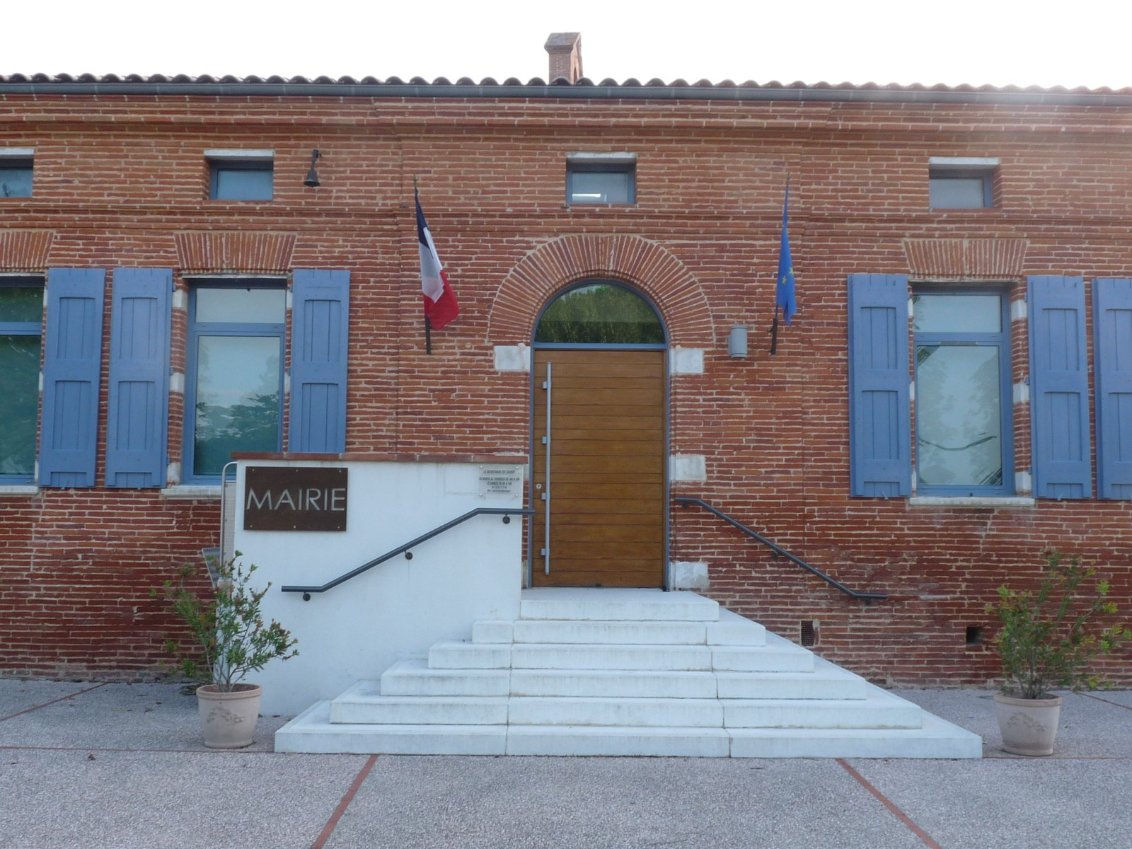 Mairie d'Odars, Haute-Garonne, France